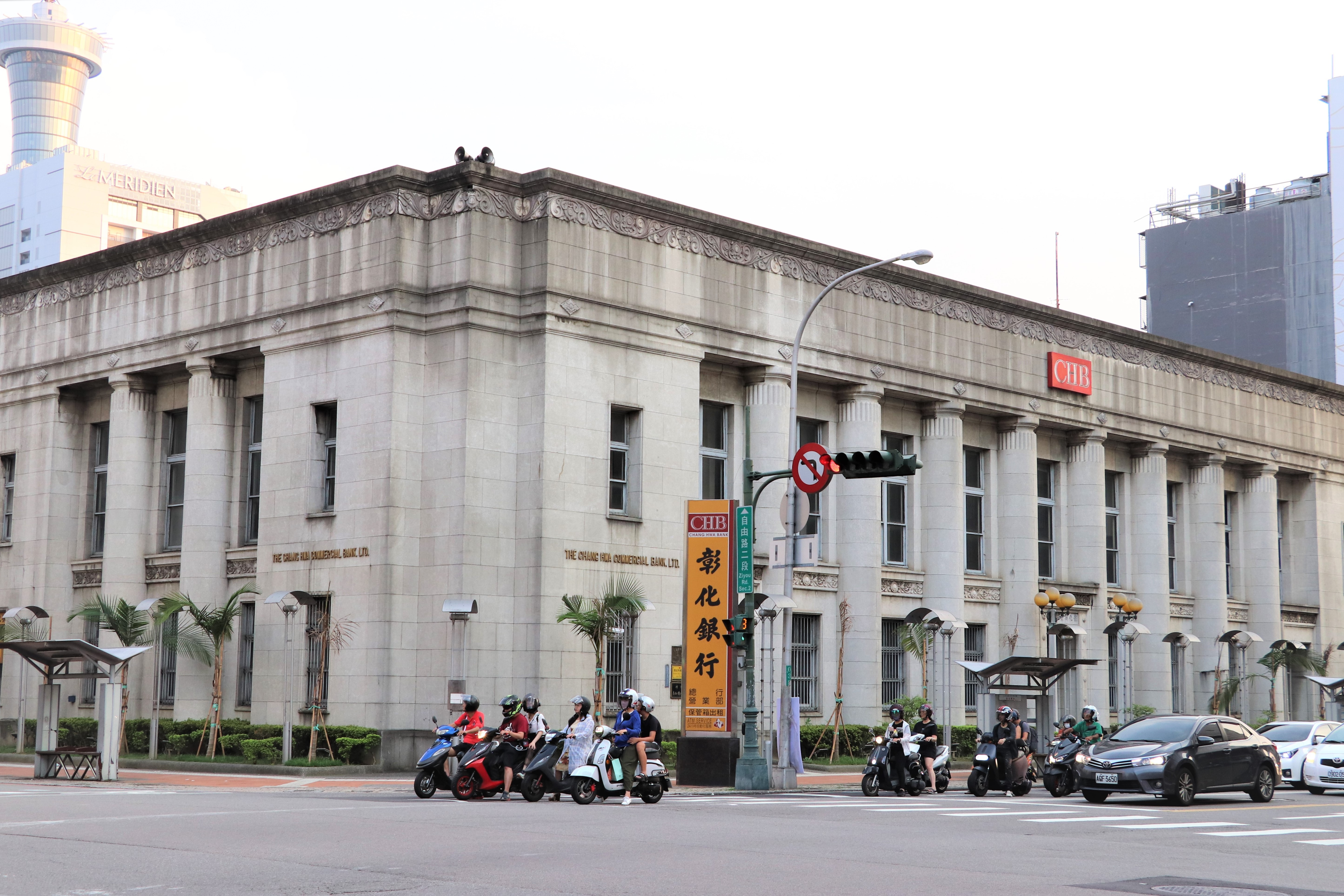 Chang Hwa Bank Headquarters and Museum/soon yee siang